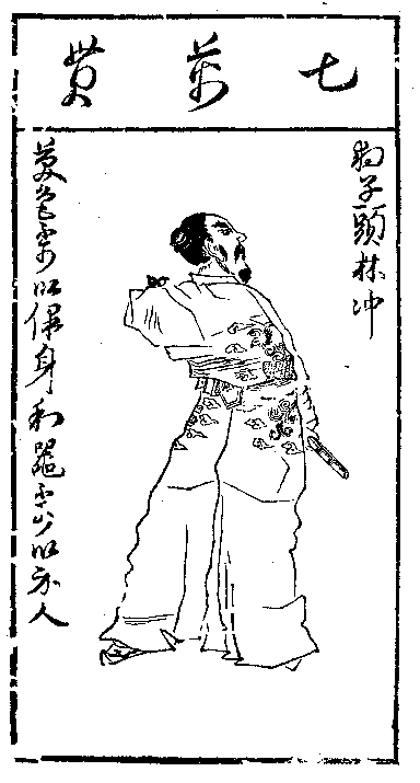 明 陈老莲 木刻版画《水浒叶子》林冲